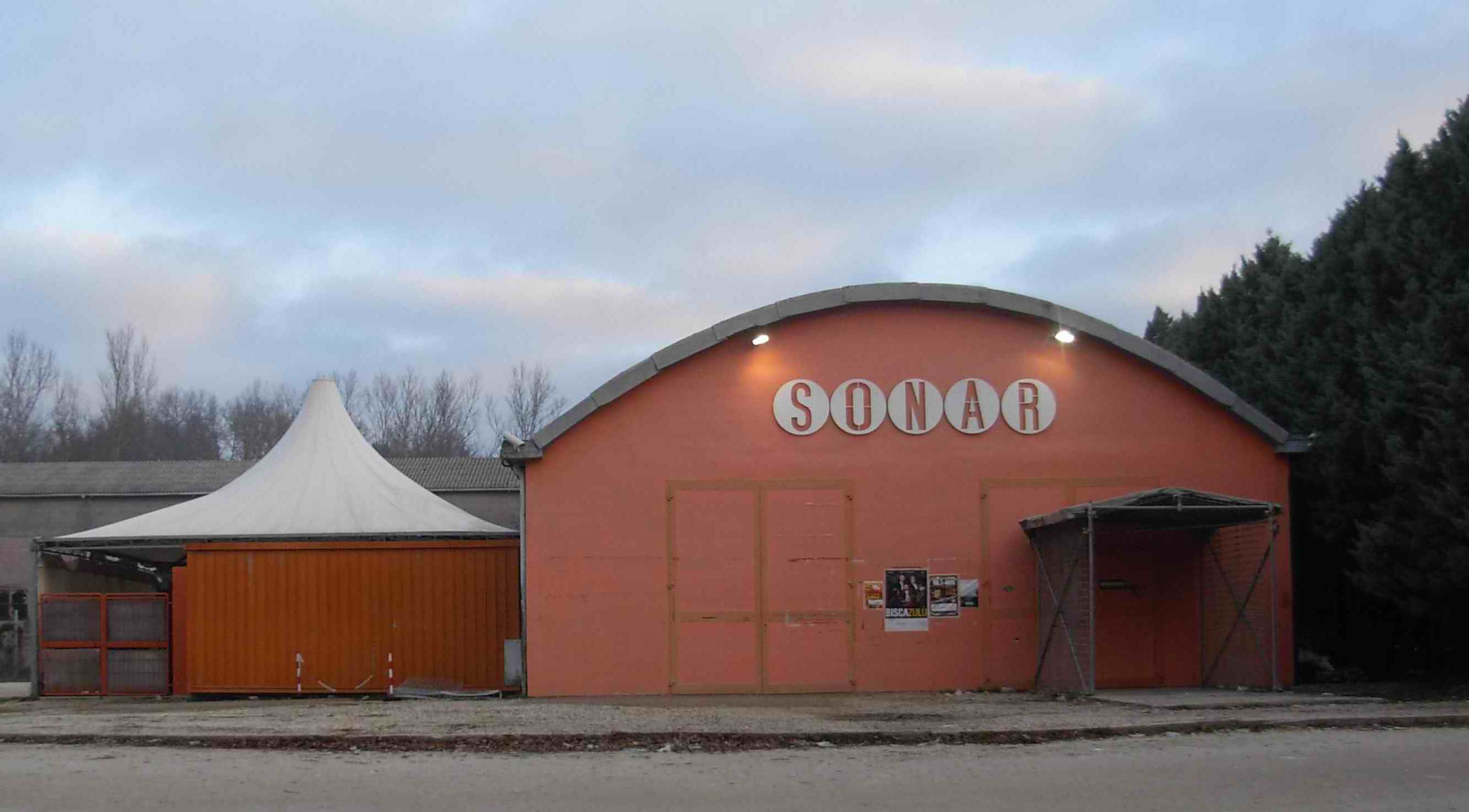 Colle di Val d'Elsa (Siena - Italia): Il Sonar - la Casa della Musica